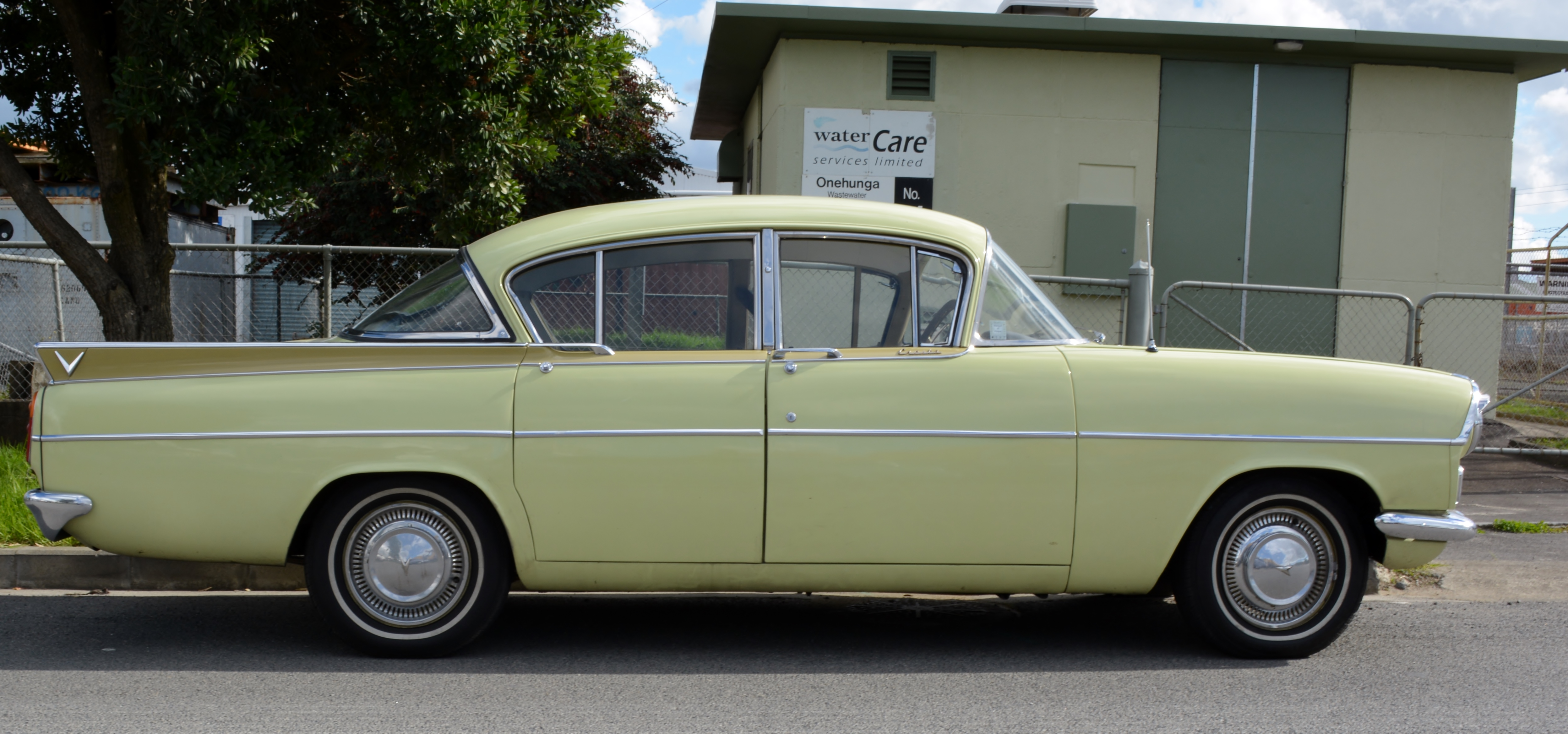 Auckland,New Zealand